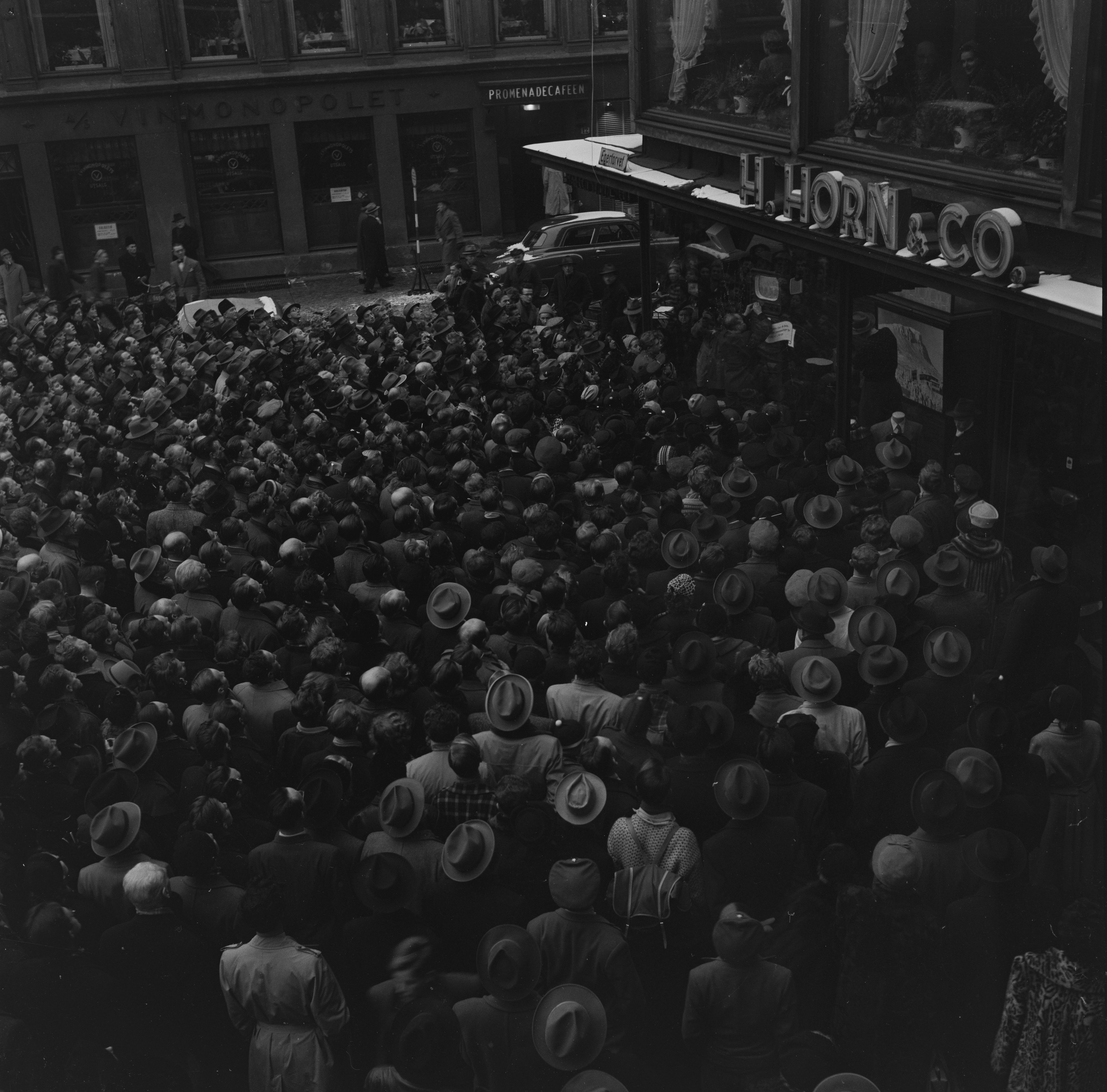 Bildet er hentet fra Arkivverket. Folk har samlet seg for å se de første norske fjernsynsbilder, 12. januar 1954. Arkivinstitusjon : Riksarkivet Arkivnavn : Billedbladet NÅ Sted : Norge, Oslo, Oslo, Egertorget Emneord: TV, Fjernsyn Avbildet